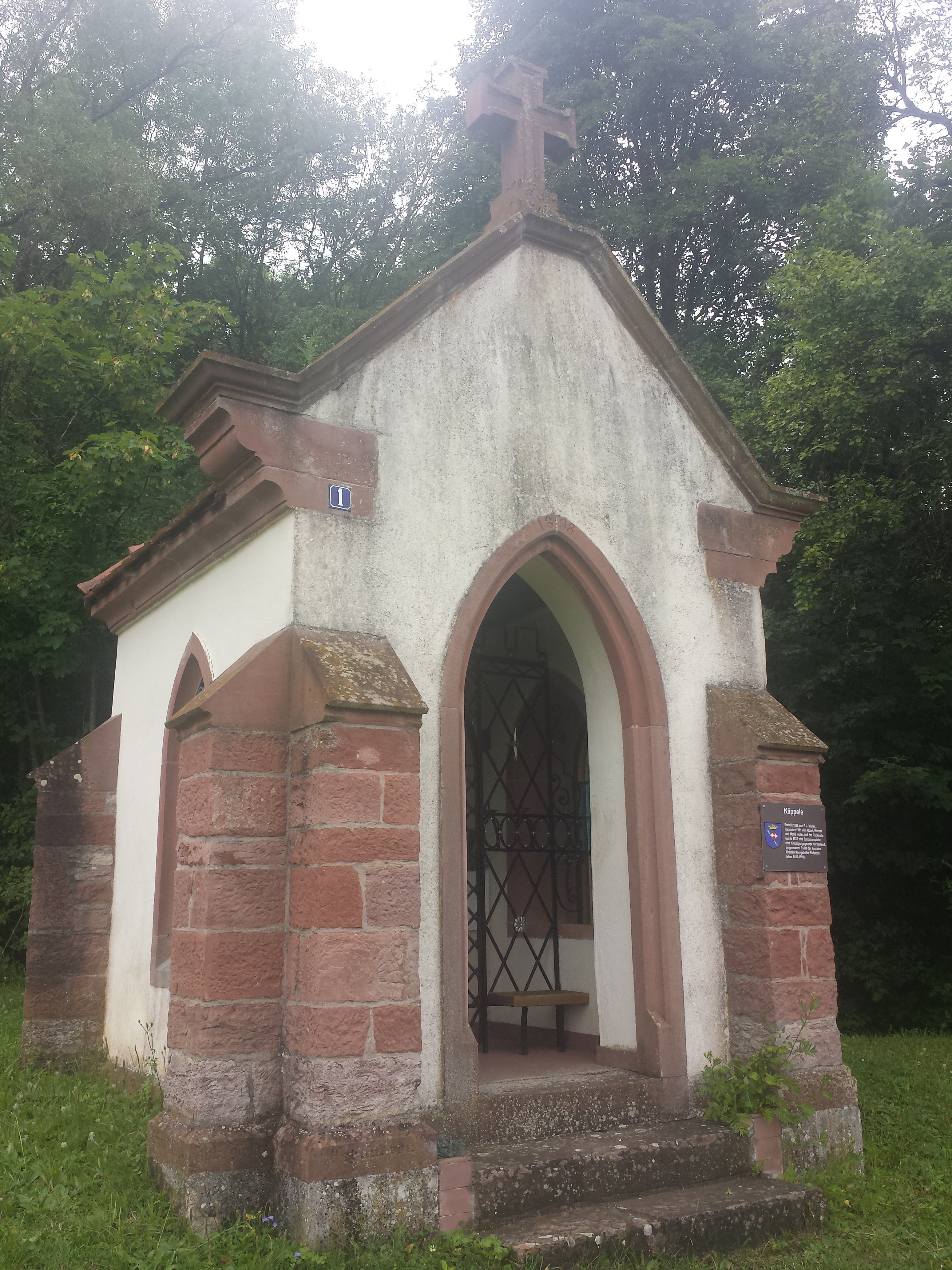 Das "Käppele" in Königshofen am Wegrand des Jakobsweges Main-Taubertal.